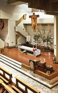 Chiesa dell'Ascensione di Nostro Signore Gesù Cristo (Firenze) - presbiterio